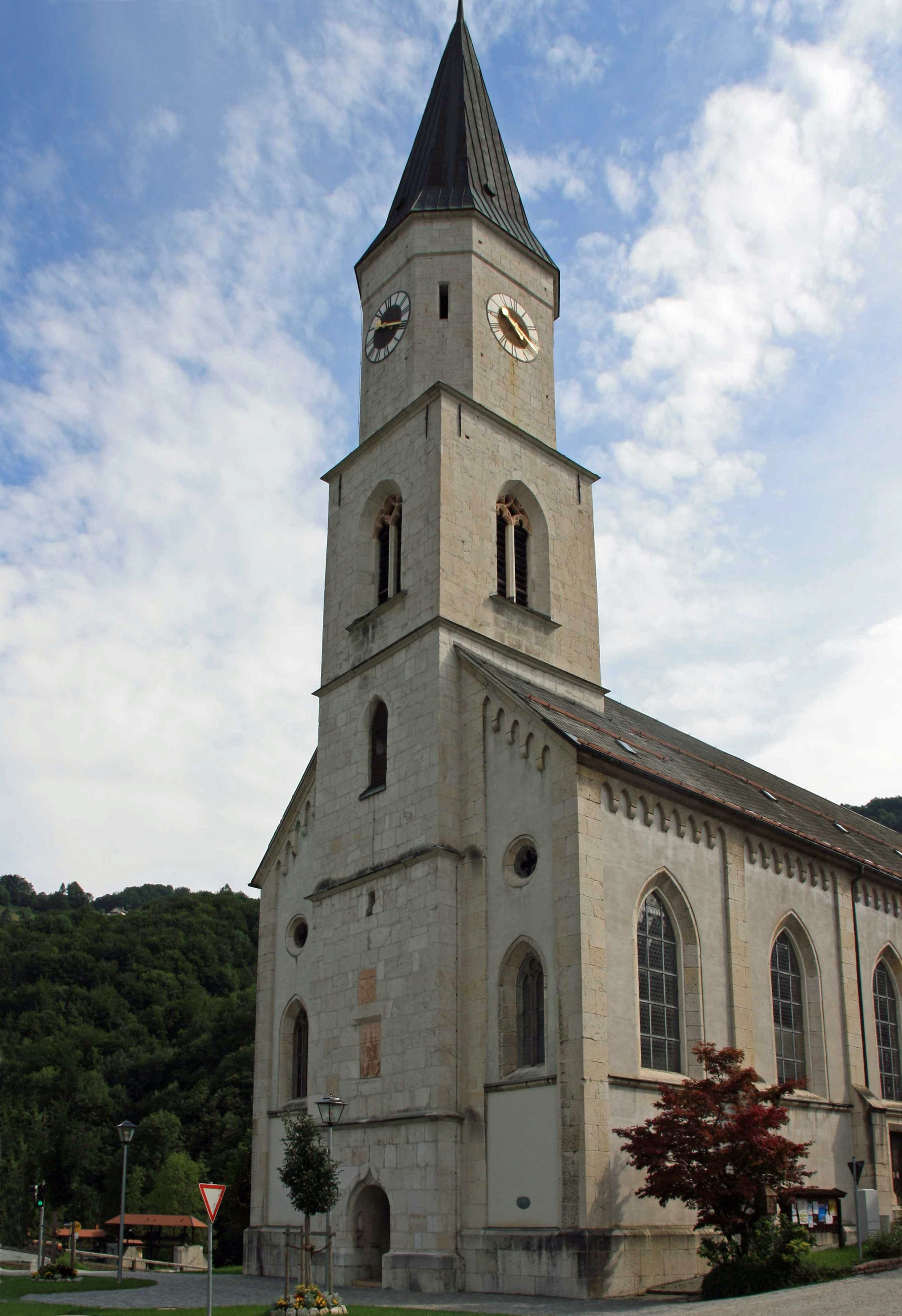 Die Kirche von Marktschellenberg, Oberbayern